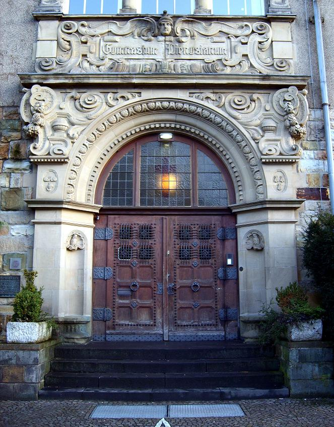 Portal des Gymnasiums Dionysianum, Rheine